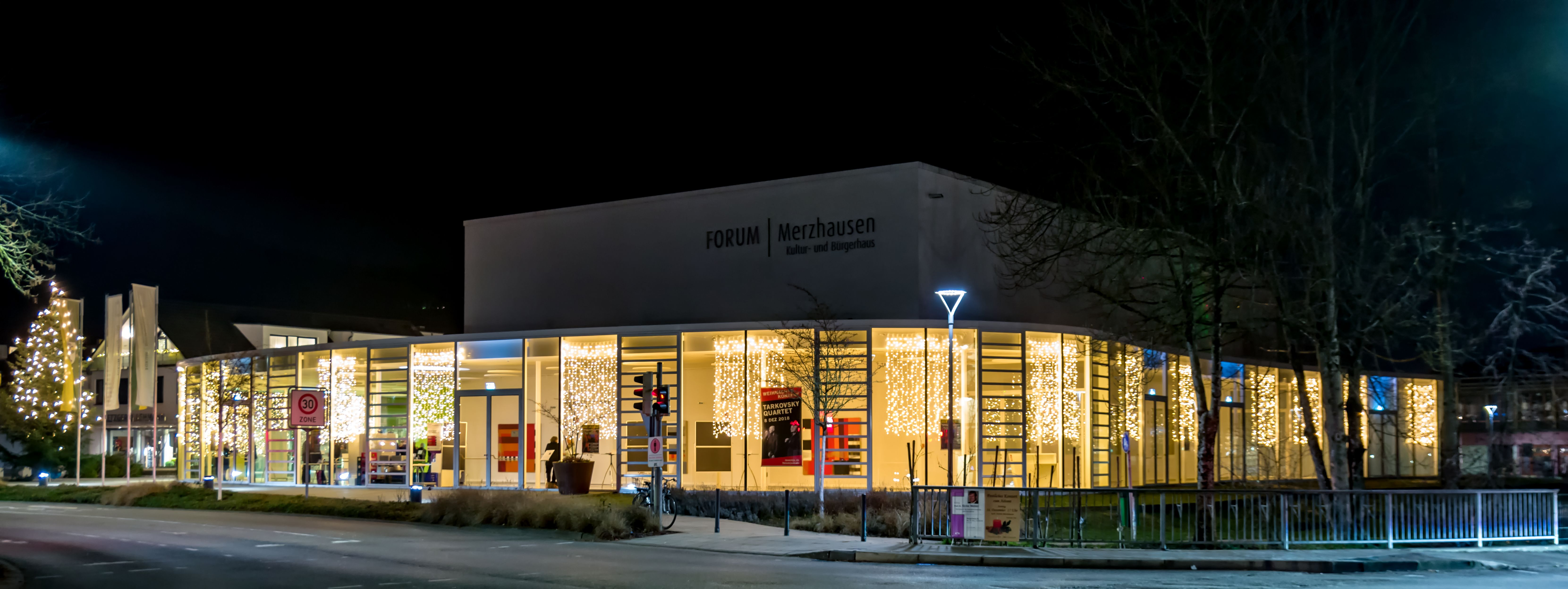 Das Forum Merzhausen am 15.12. 2018